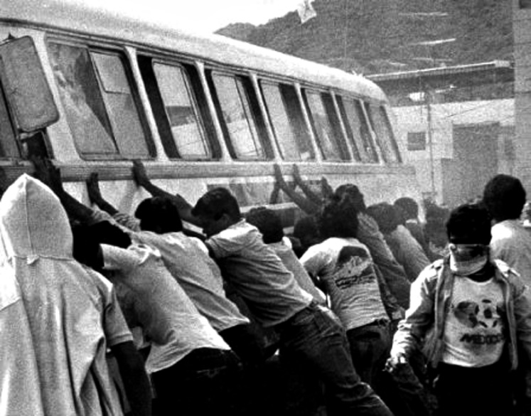 (El Caracazo) Foto tomada en el Terminal de Autobuses de Guarenas.